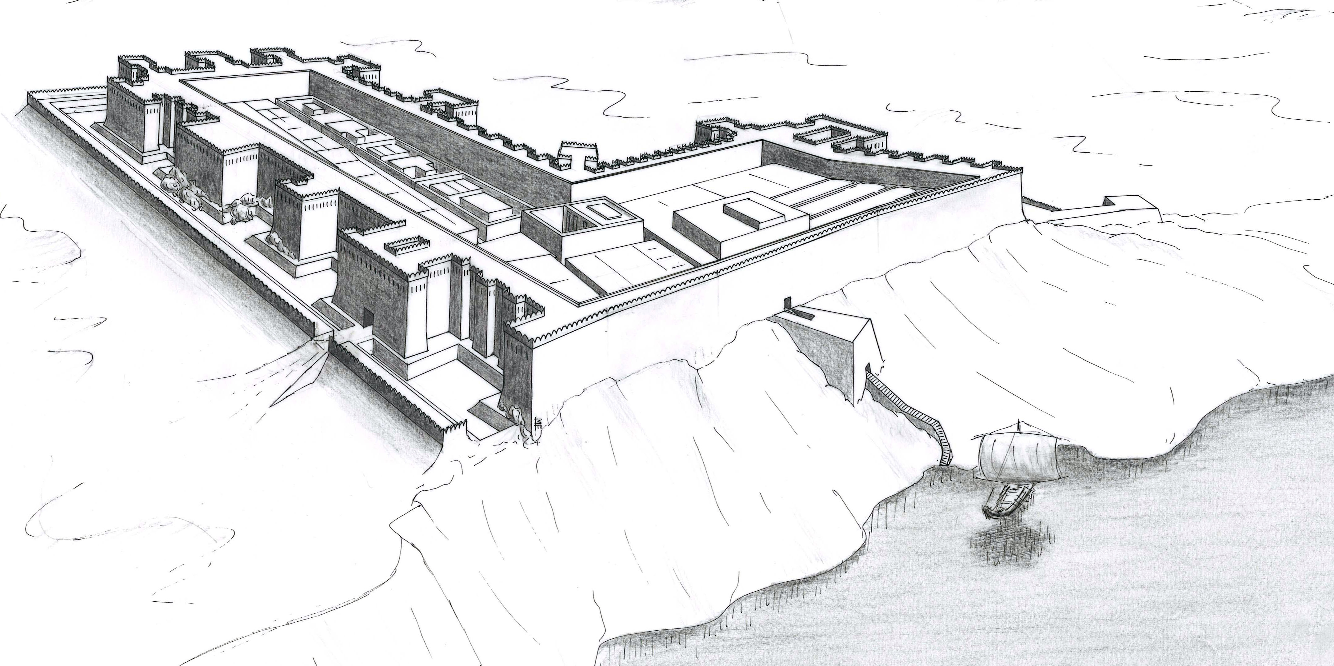 une vue perspective de la forteresse de Semna ouest